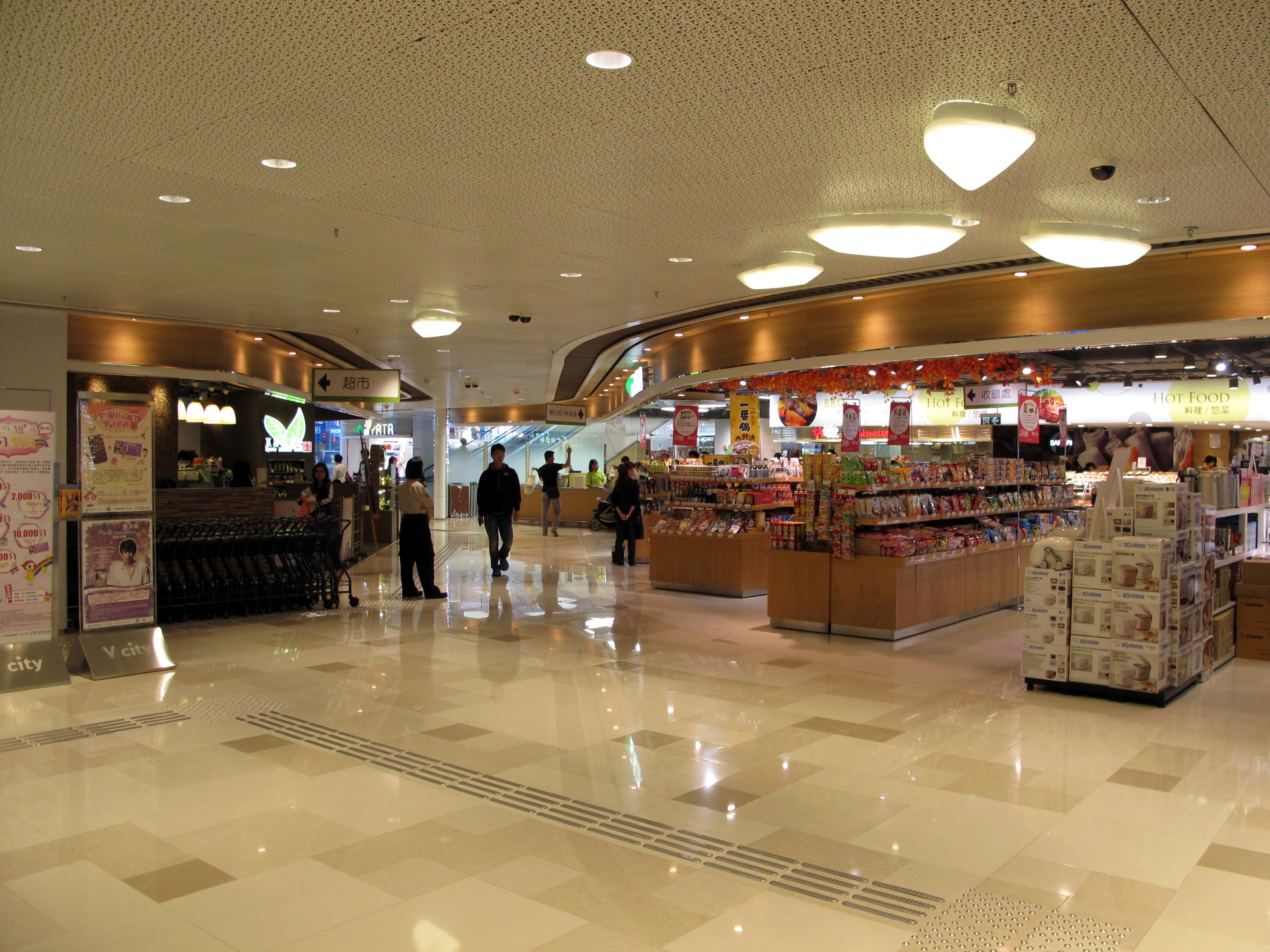 V City Yata Supermarket